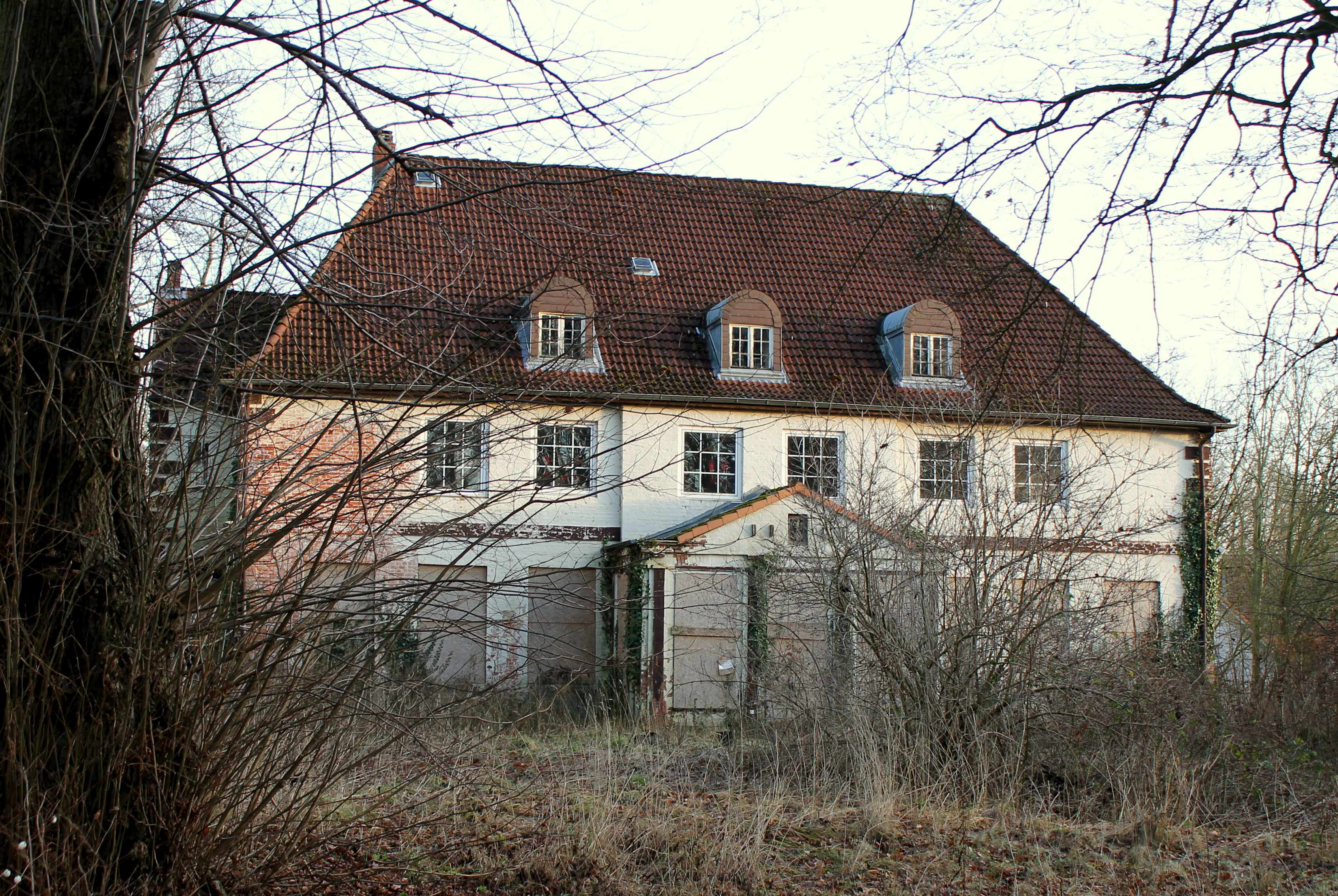 Herrenhaus im Bad Oldesloer Ortsteil Rethwischhof, gelegen in der Straße Zum Amt 2. Denkmalnummer in Schleswig-Holstein: 12560